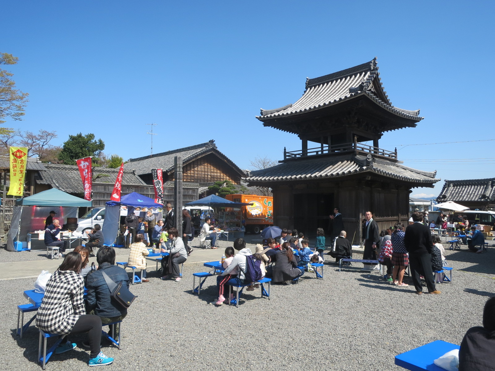 養寿寺（西尾市下矢田町）